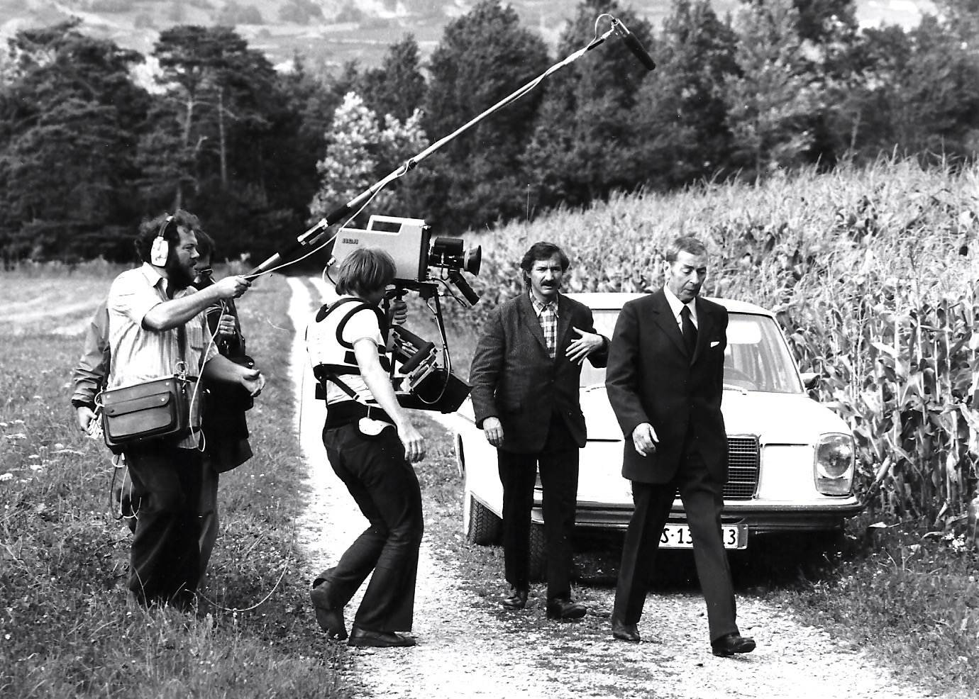 Utilisation du système EVN pour le tournage